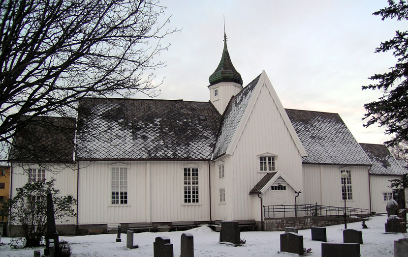 Mo church, Mo i Rana.